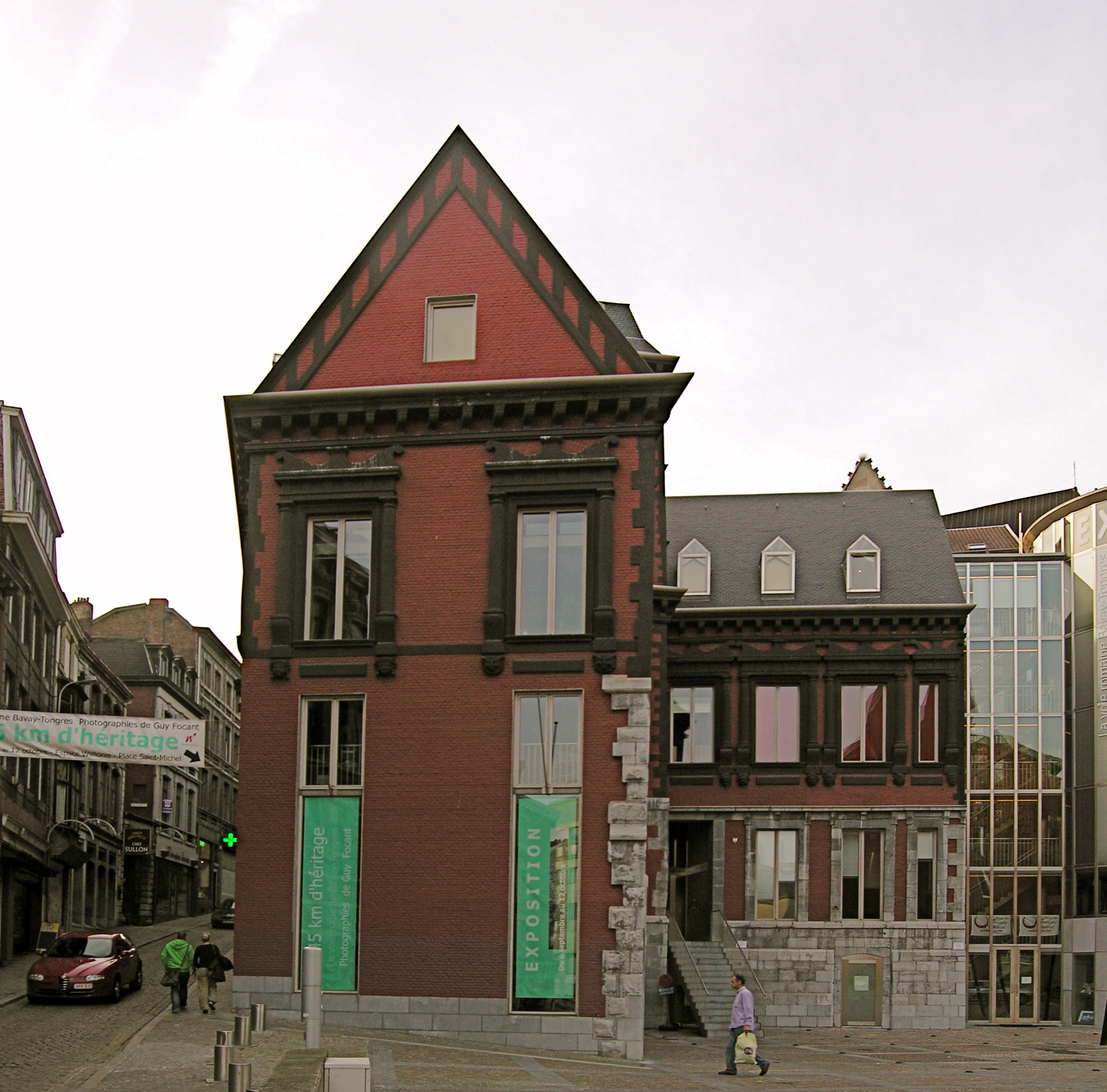 Liège (Belgium) l'hôtel d'Elderen casal de la família d'Elderen Paleis van de familie van Elderen